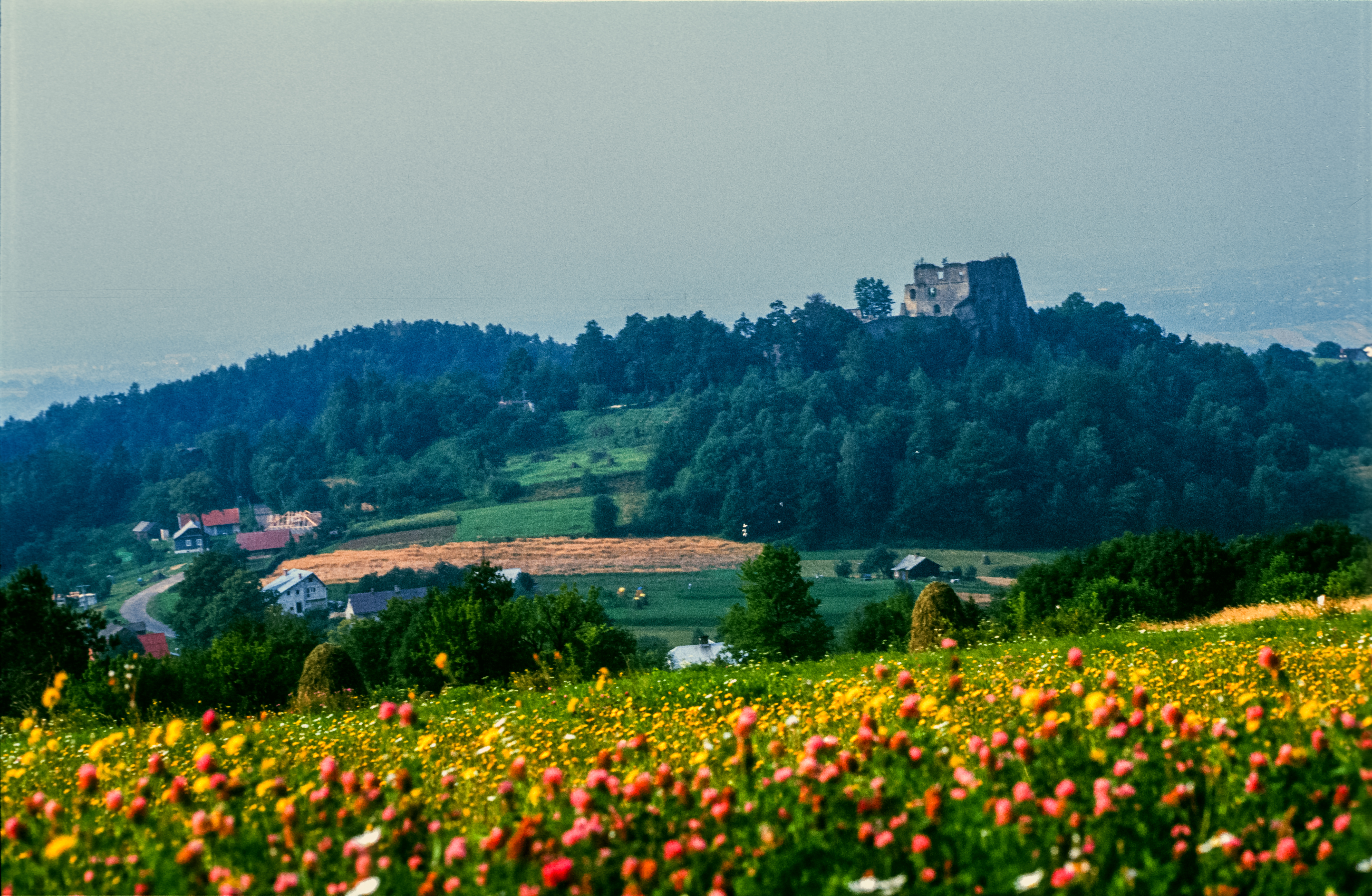 Odrzykoń, zamek Kamieniec, ruiny zamku